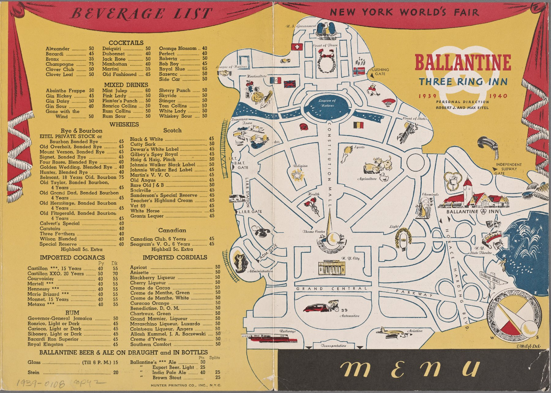 Speisekarte mit Plan des Messegeländes, Ballentine Three Ring Inn von Robert und Max Eitel, Weltausstellung 1939/1940 in New York.